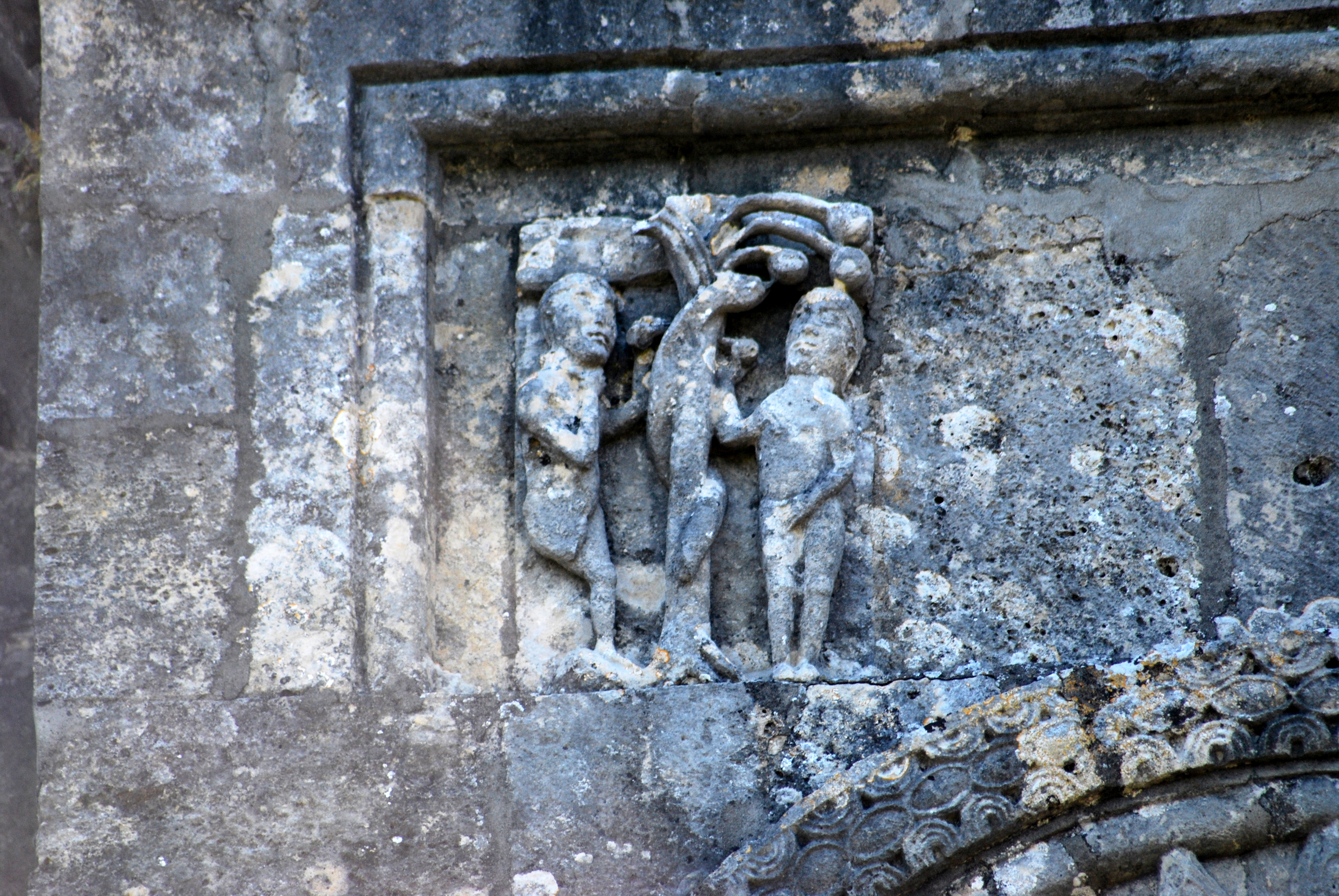 Loupiac église Saint Pierre